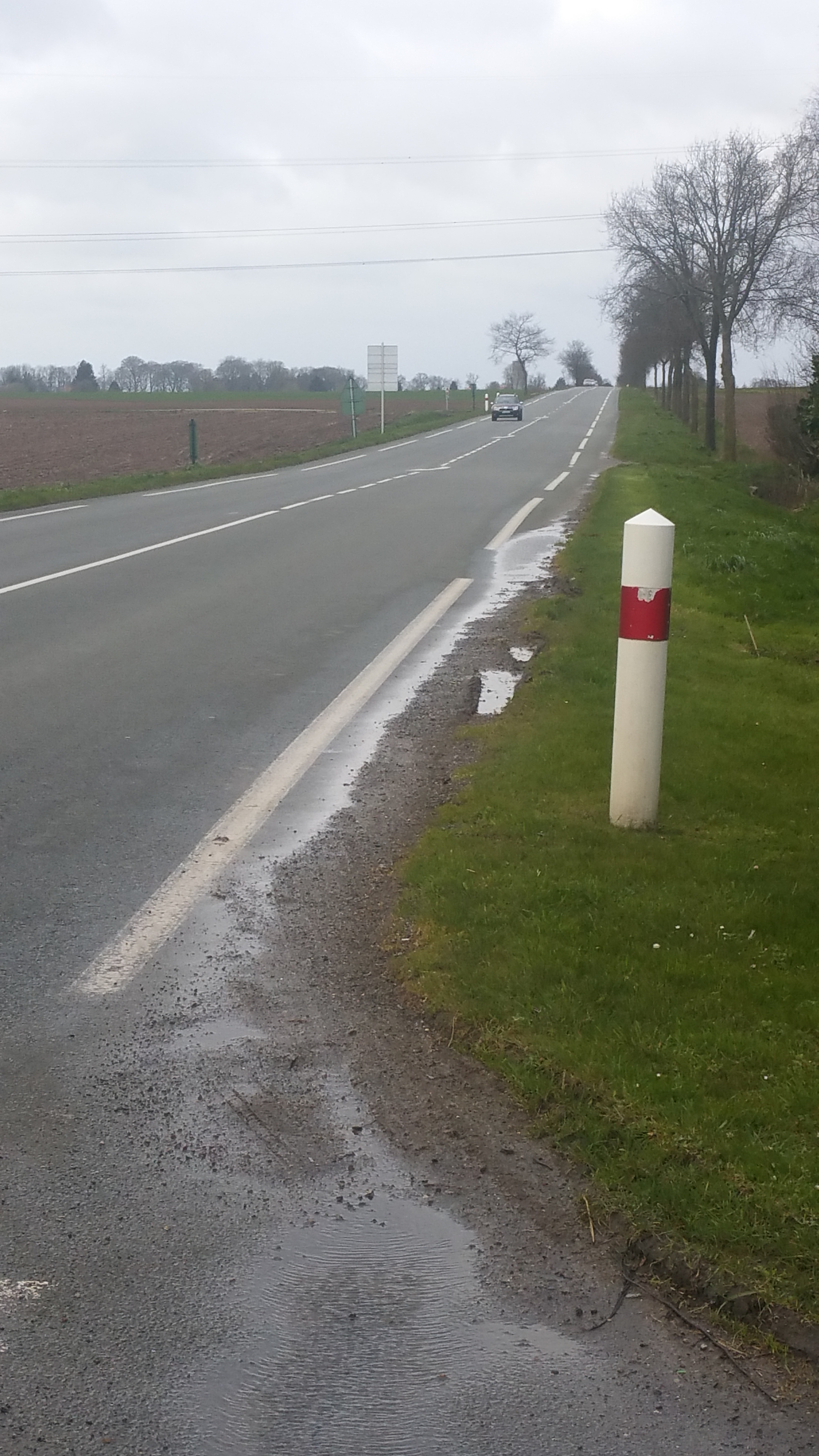 Vue de la D941 (ancienne RN 41) à hauteur du hameau de la gare à Brias. Le fond de l'image constitue la direction du centre de Brias.